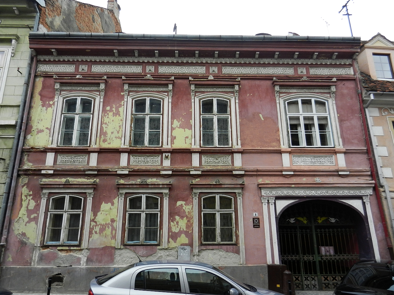 Casă monument istoric